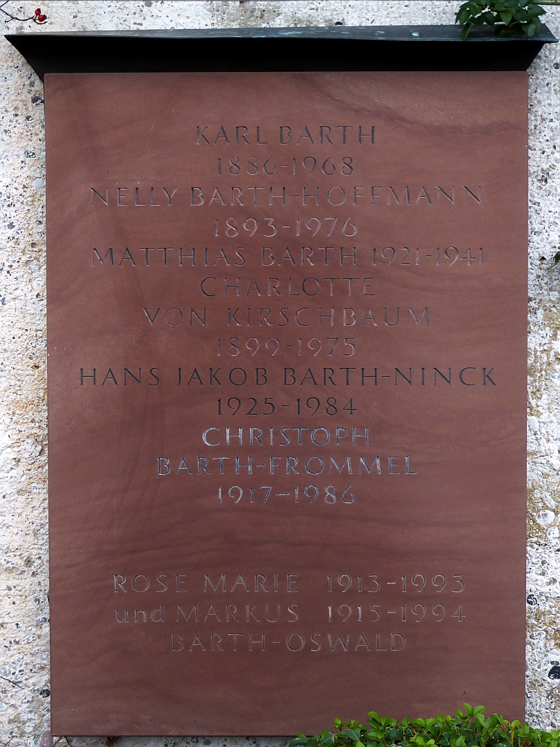 Charlotte von Kirschbaum (1899–1975), Theologin, Anthropologie und Theologie der Geschlechter, Vorläuferin der feministischen Theologie. Familiengrab auf dem Friedhof Hörnli, Riehen, Basel-Stadt